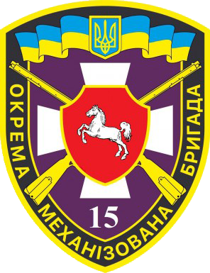 Нарукавний знак, 15 окрема механізована бригада